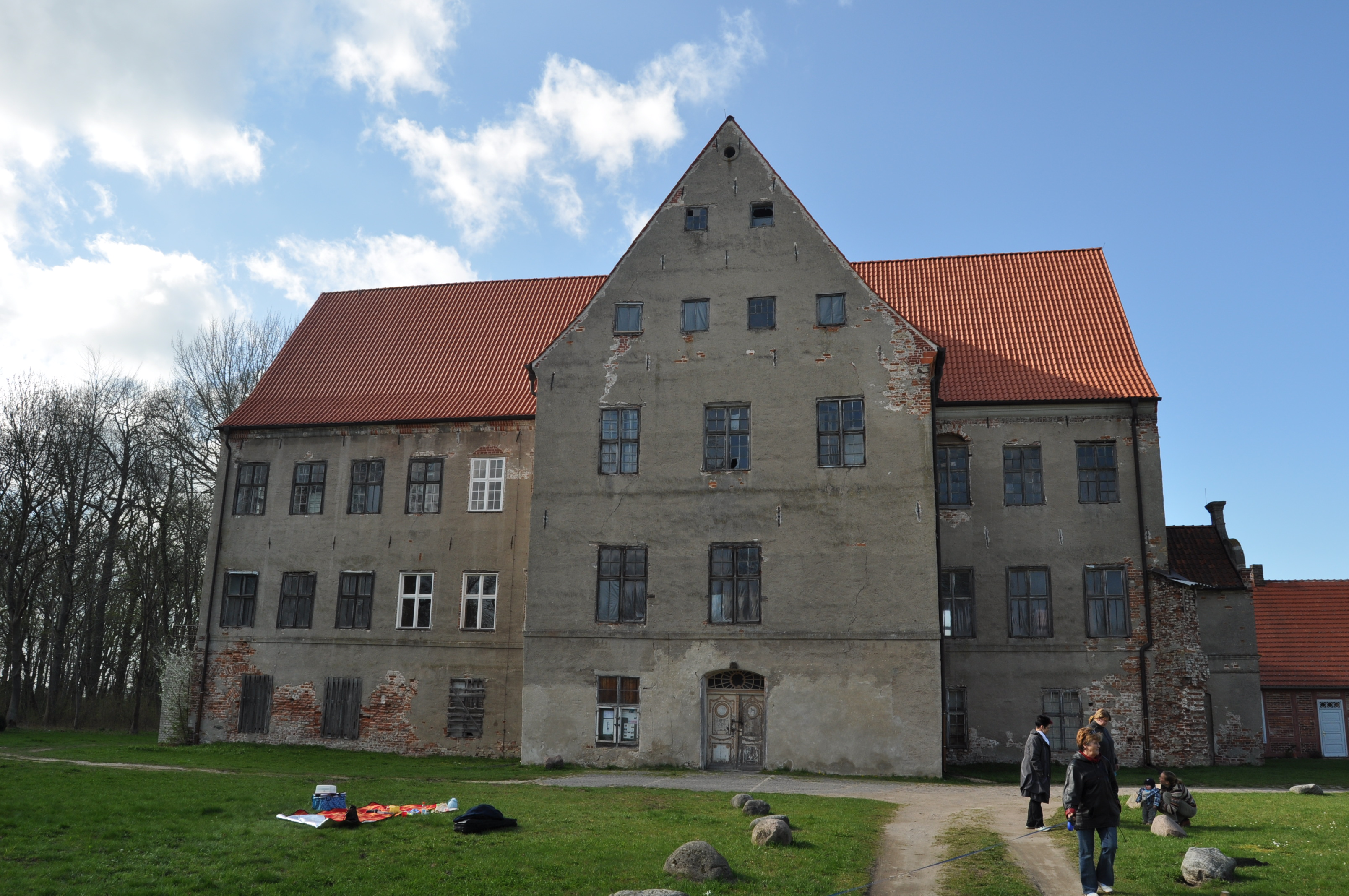 Schloss Ludwigsburg Südseite mit Eingang